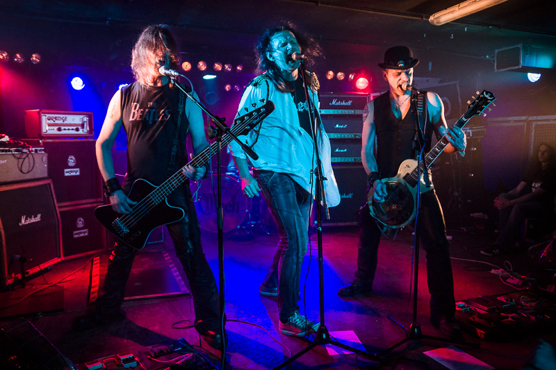 Zespół Mech podczas koncertu charytatywnego Stefan Fest w klubie Fonobar w Warszawie, 1 maja 2013.